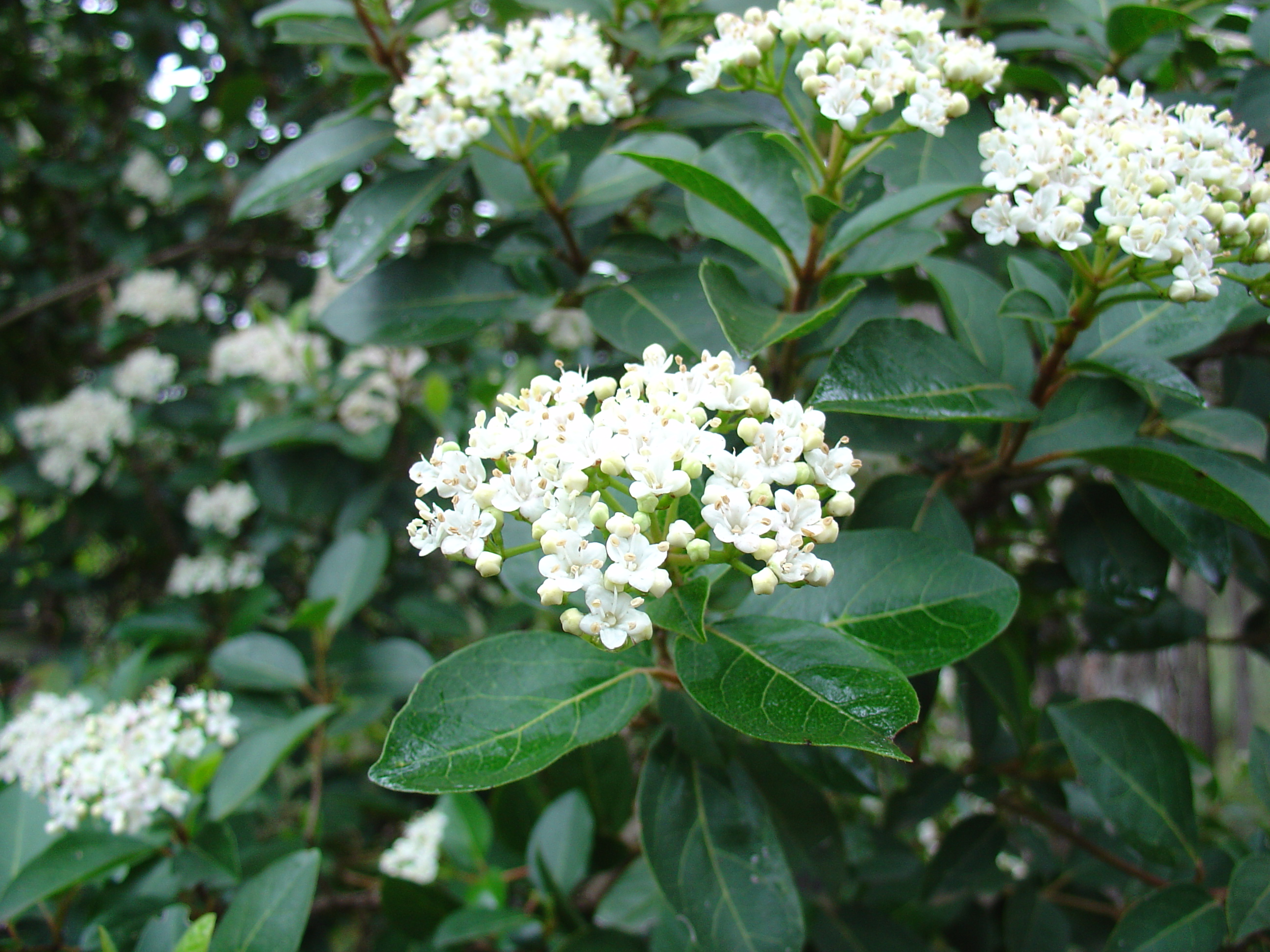 Viburnum tinus from Sª Espuña, Murcia, Spain